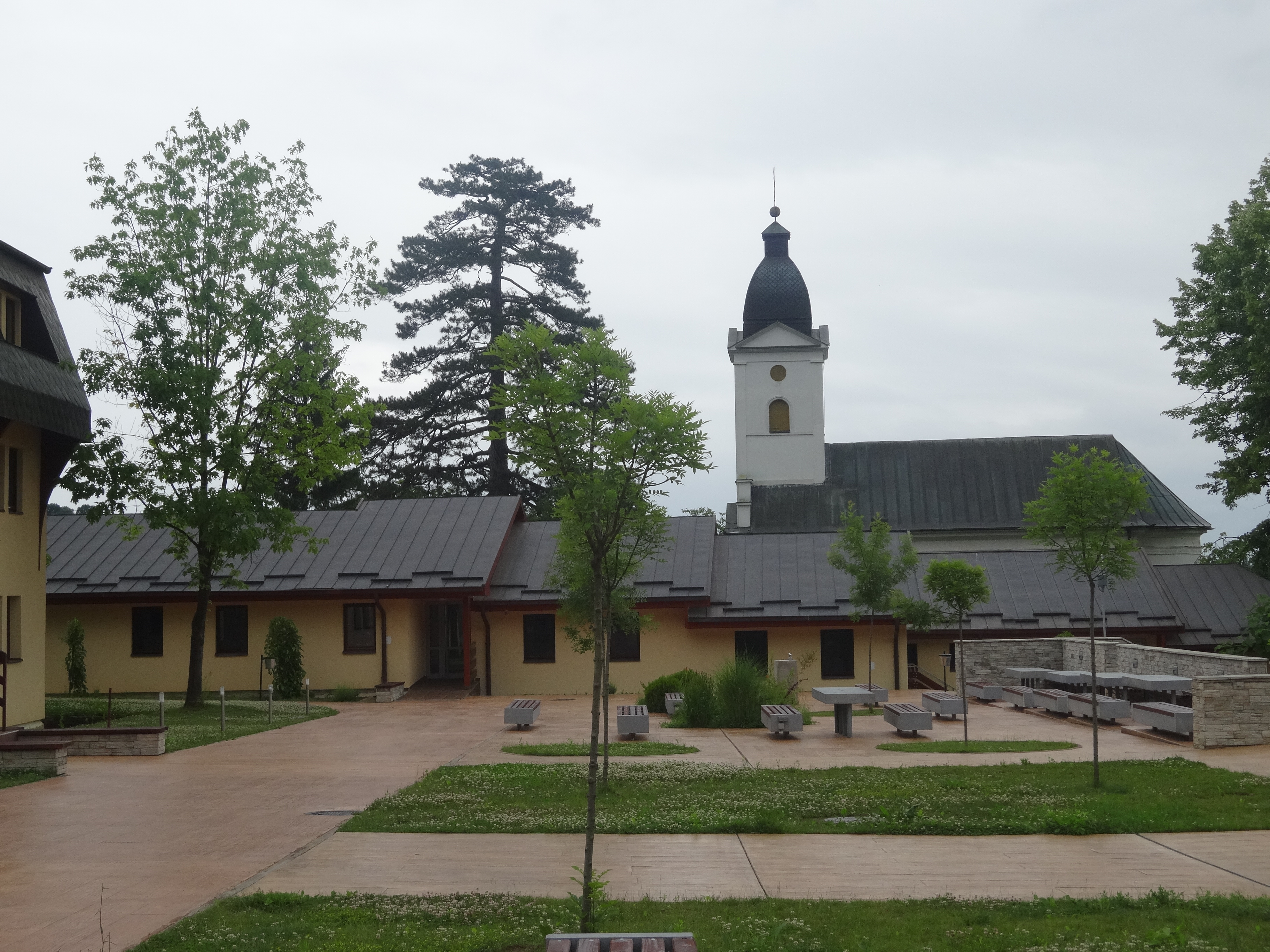 Istraživačka stanica Petnica - biblioteka.